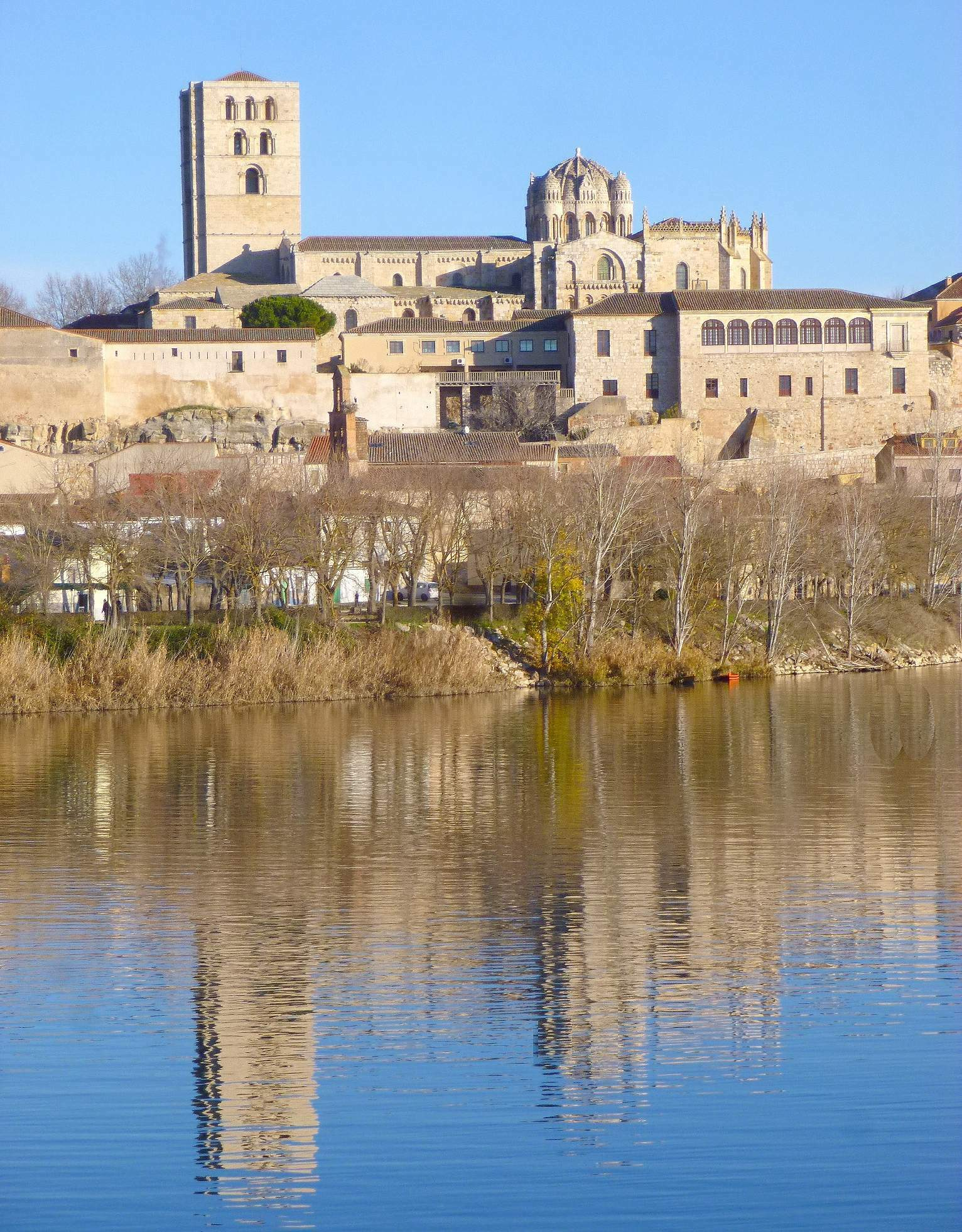 Zamora - Río Duero y Catedral